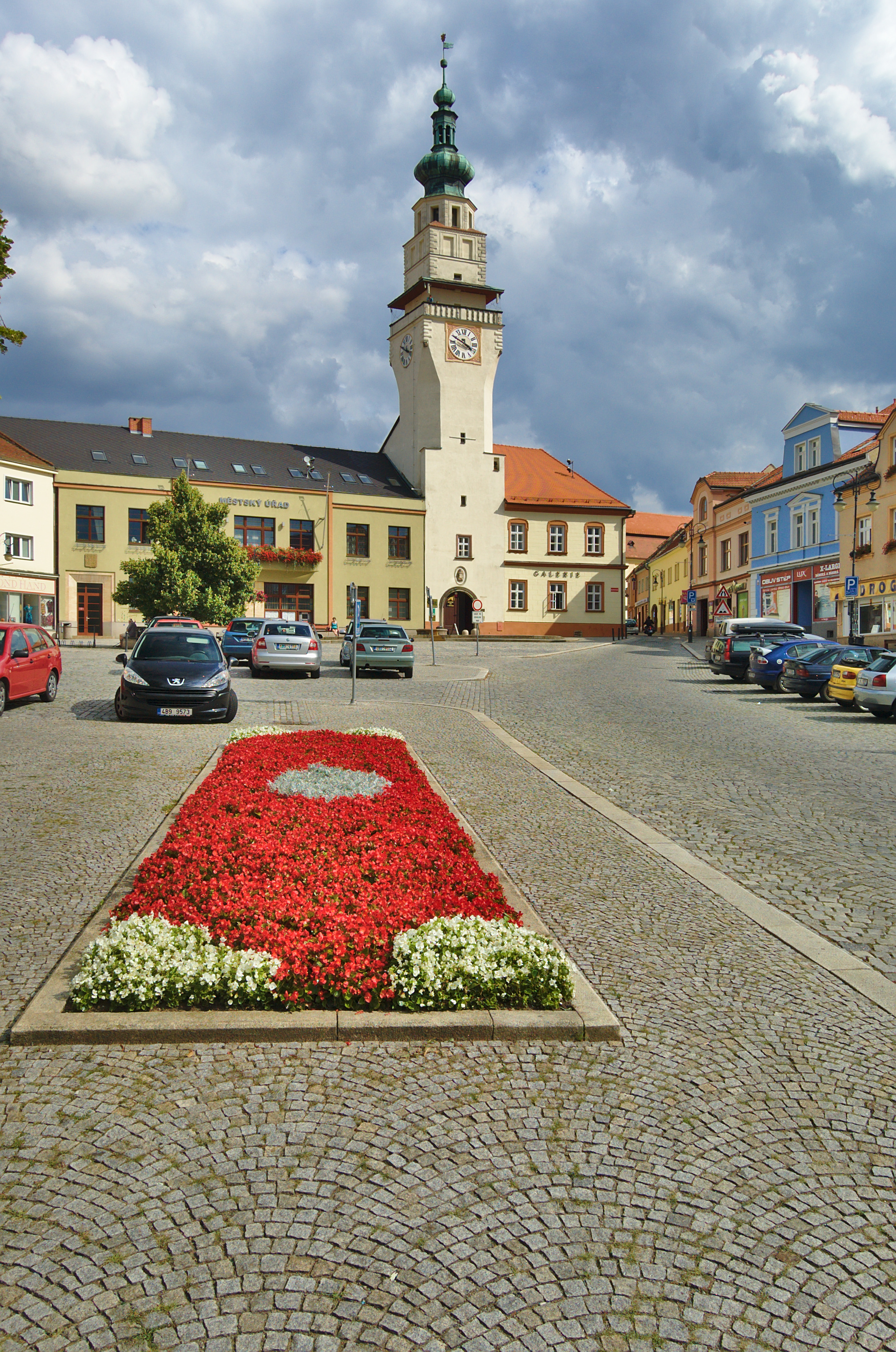 Radnice, Boskovice, okres Blansko